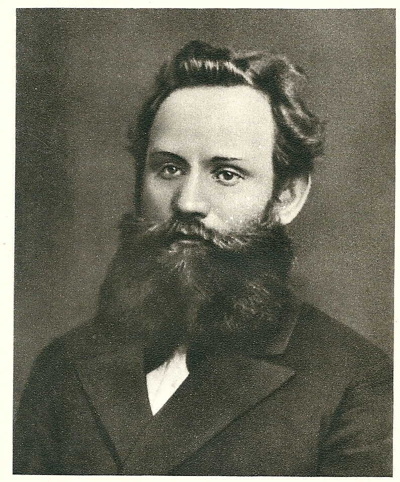 Ivan Pavlov à l'époque de son doctorat